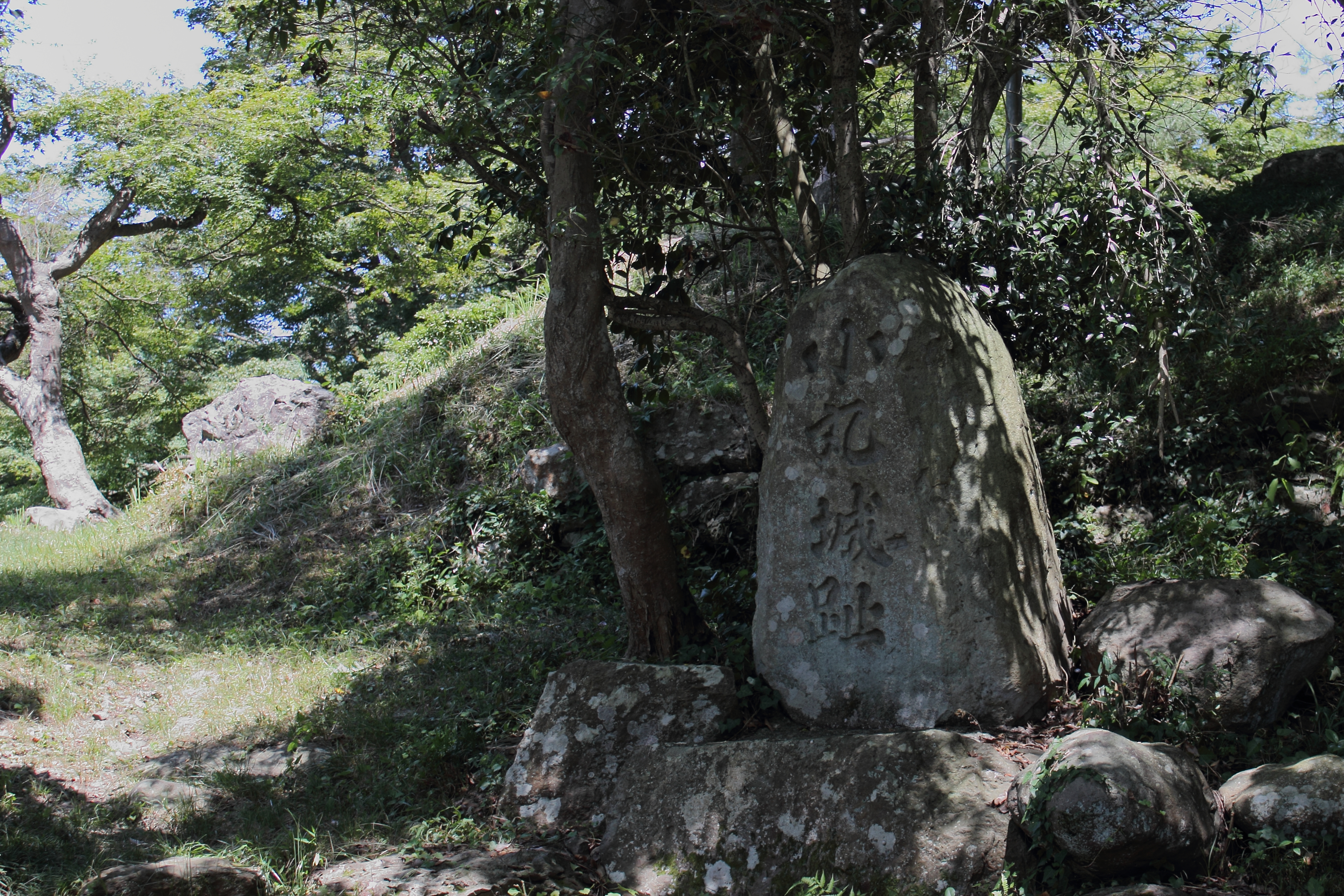 小丸城跡の碑